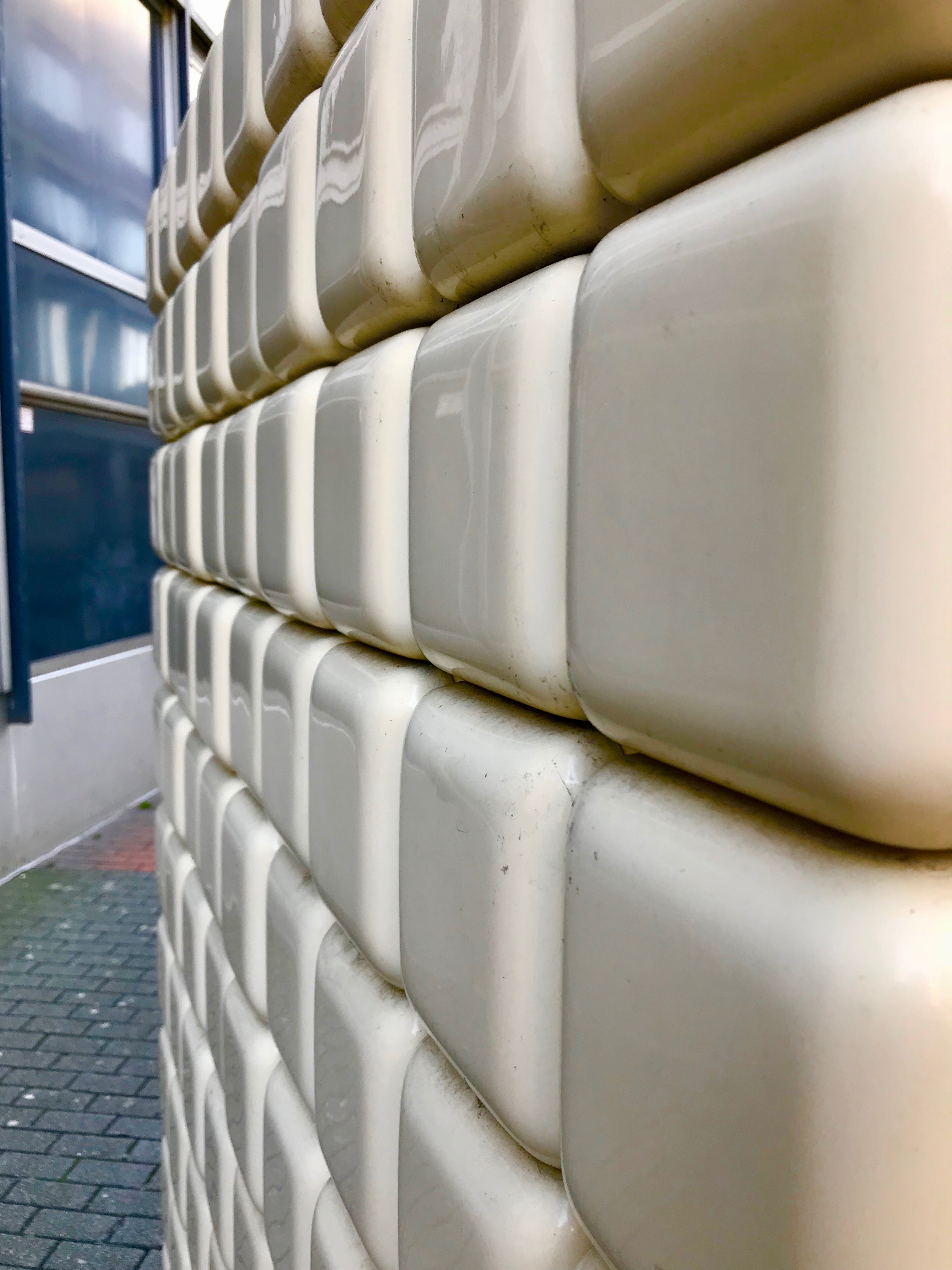 Detailaufnahme der Würfel